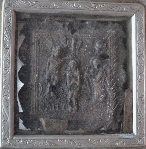 Η Βάπτιση